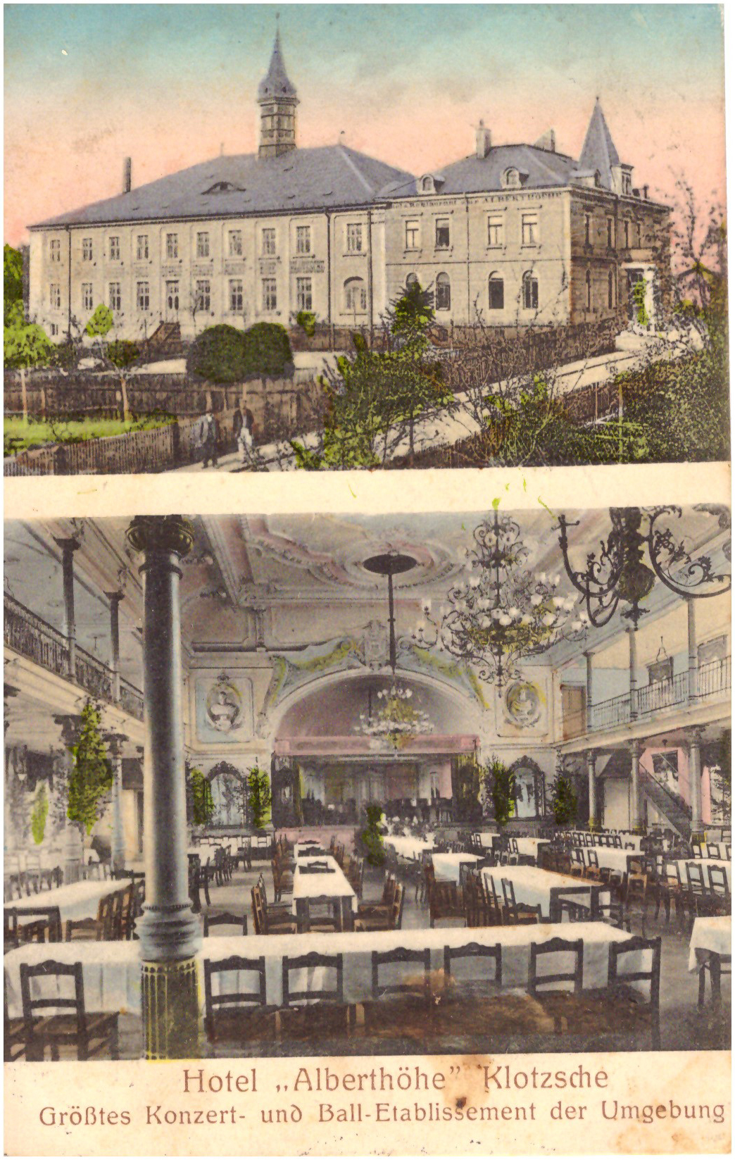 Titel: Hotel "Alberthöhe" Klotzsche, größtes Konzert- und Ball-Etablissement der Umbebung; Motiv oben: Ansicht aus nord-östlicher Richtung; unten: Innenansicht Ballsaal; Gelaufen 1899.